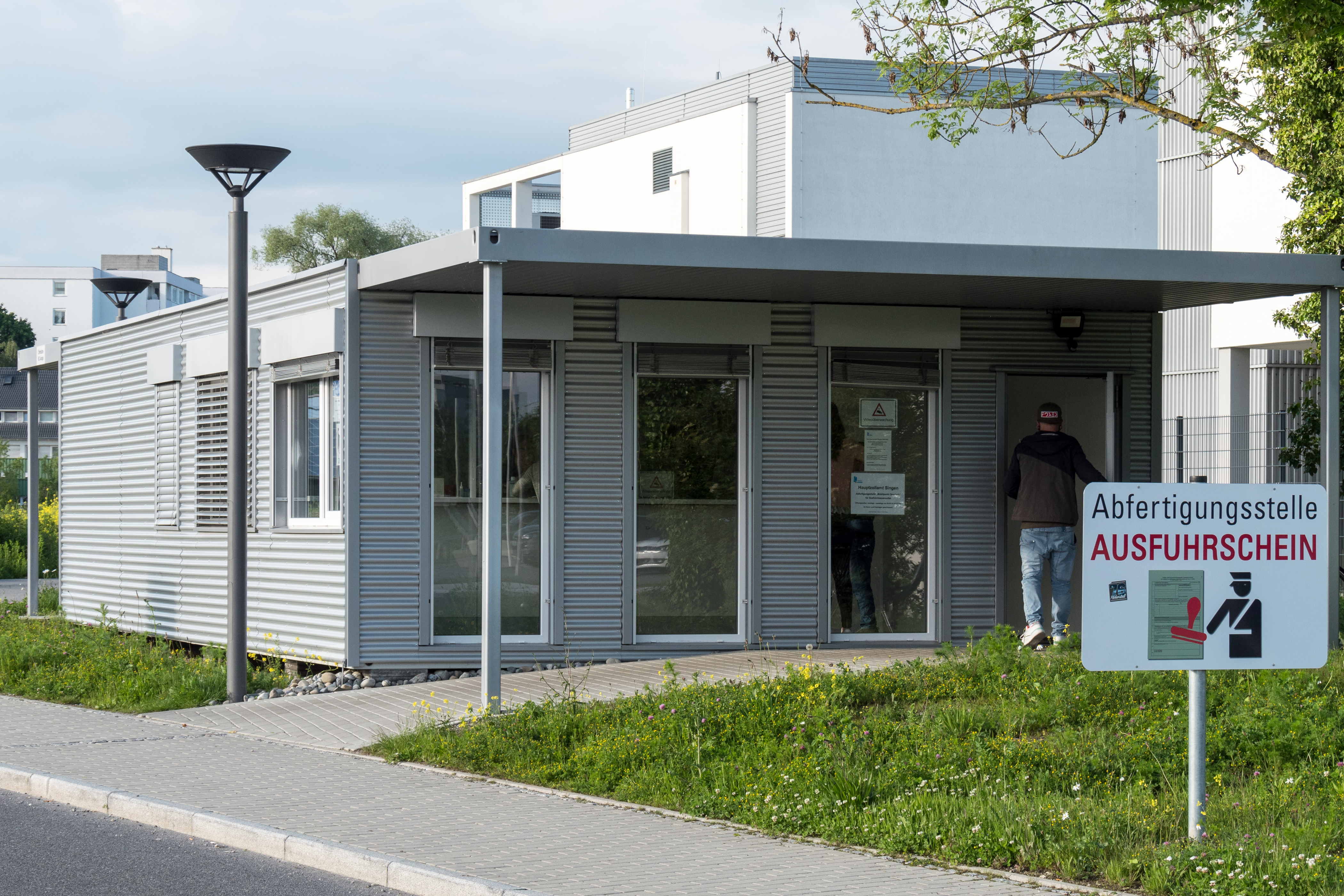 Zur Entlastung der Grenzübergänge zur Schweiz hat das Zollamt Singen an der Reichenaustraße in Konstanz eine "Abfertigungsstelle Ausfuhrschein" eingerichtet, deren Hauptaufgabe im Abstempeln von Belegen für die Erstattung der Umsatzsteuer besteht. (Keine deutsche Umsatzsteuererhebung bei Ausfuhr in das Nicht-EU-Ausland).